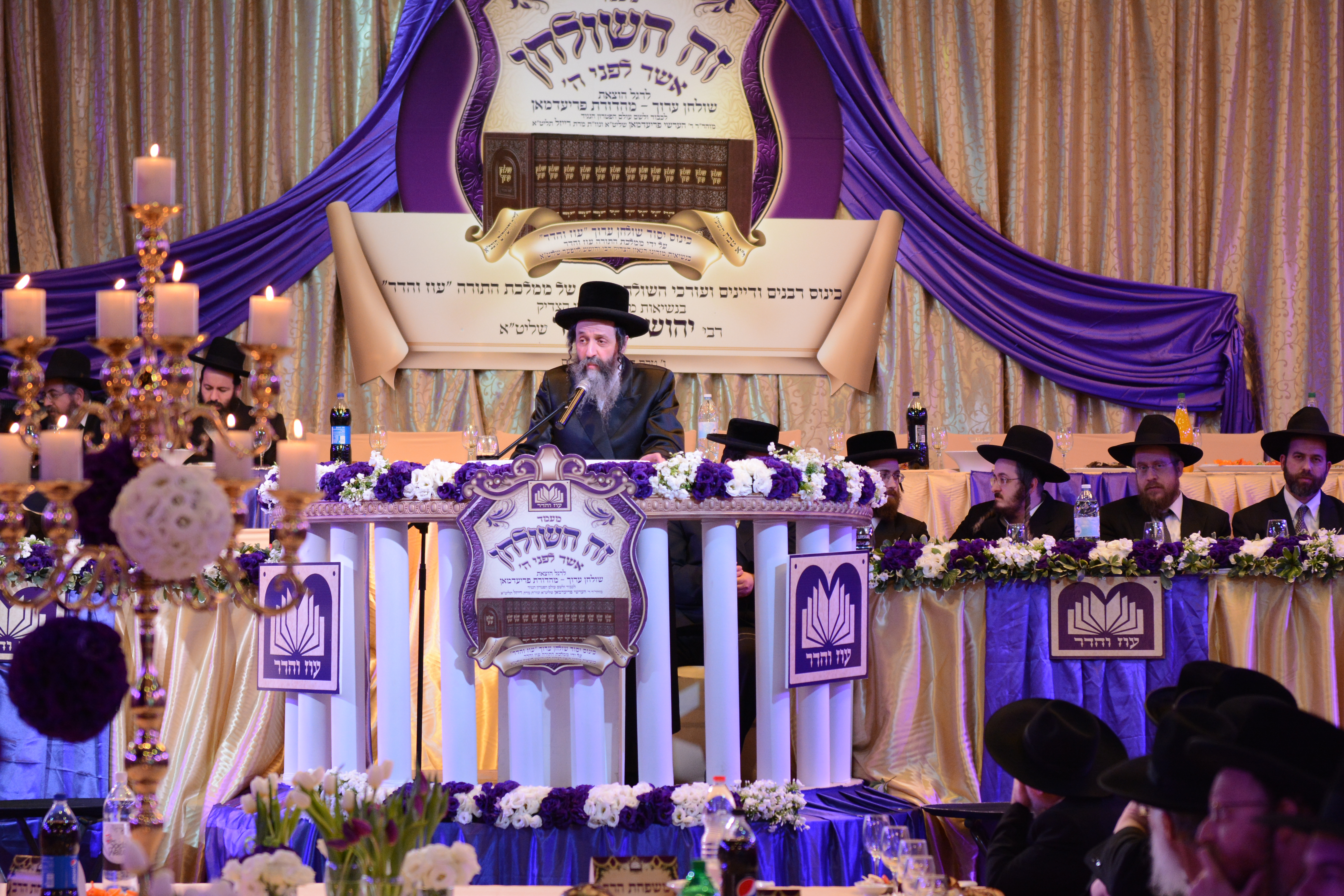 נואם במעמעד זה השלחן לרגל התחלת השלחן ערוך